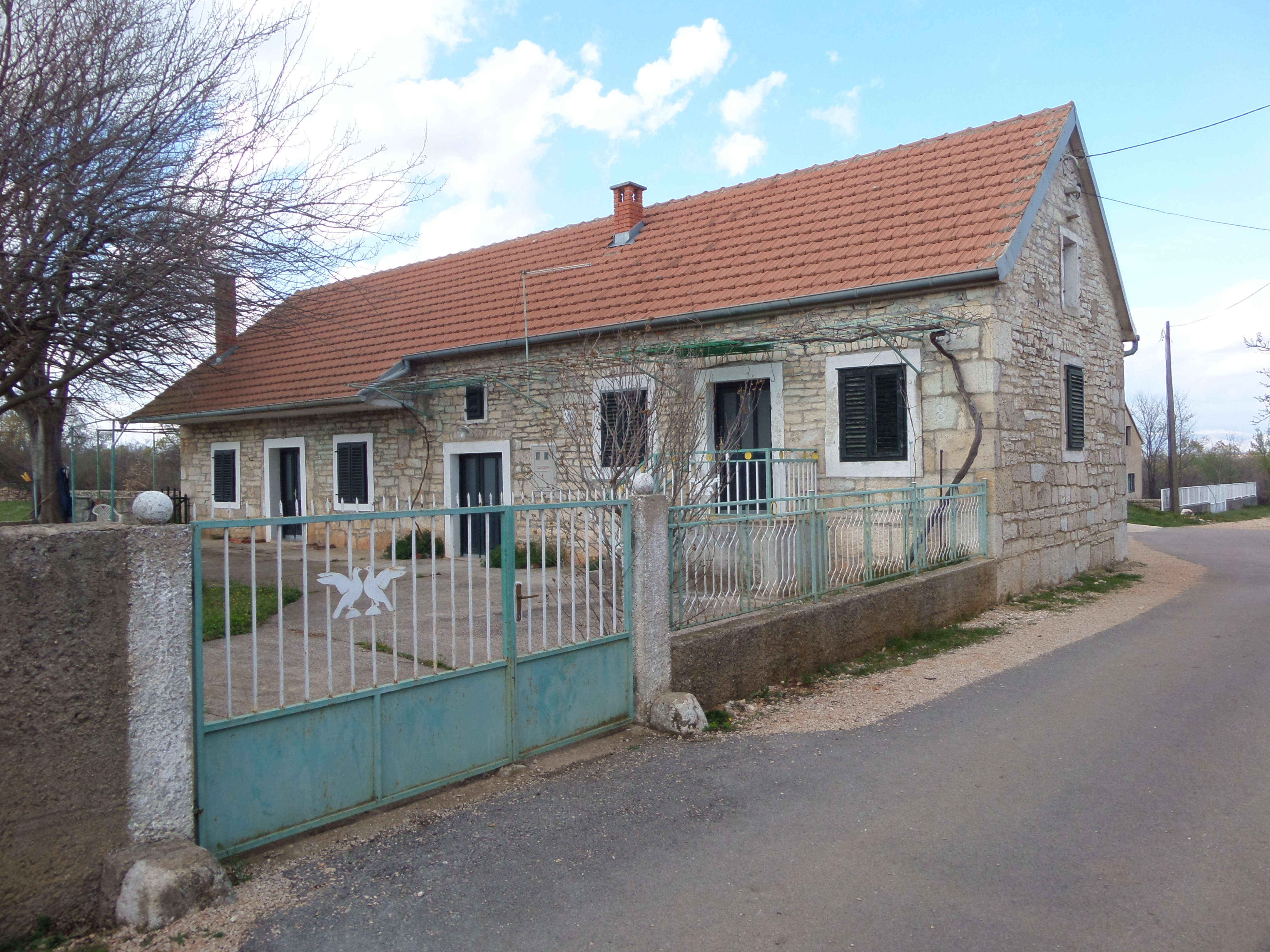 31.03.2016. _ Oklaj _ Kroatien